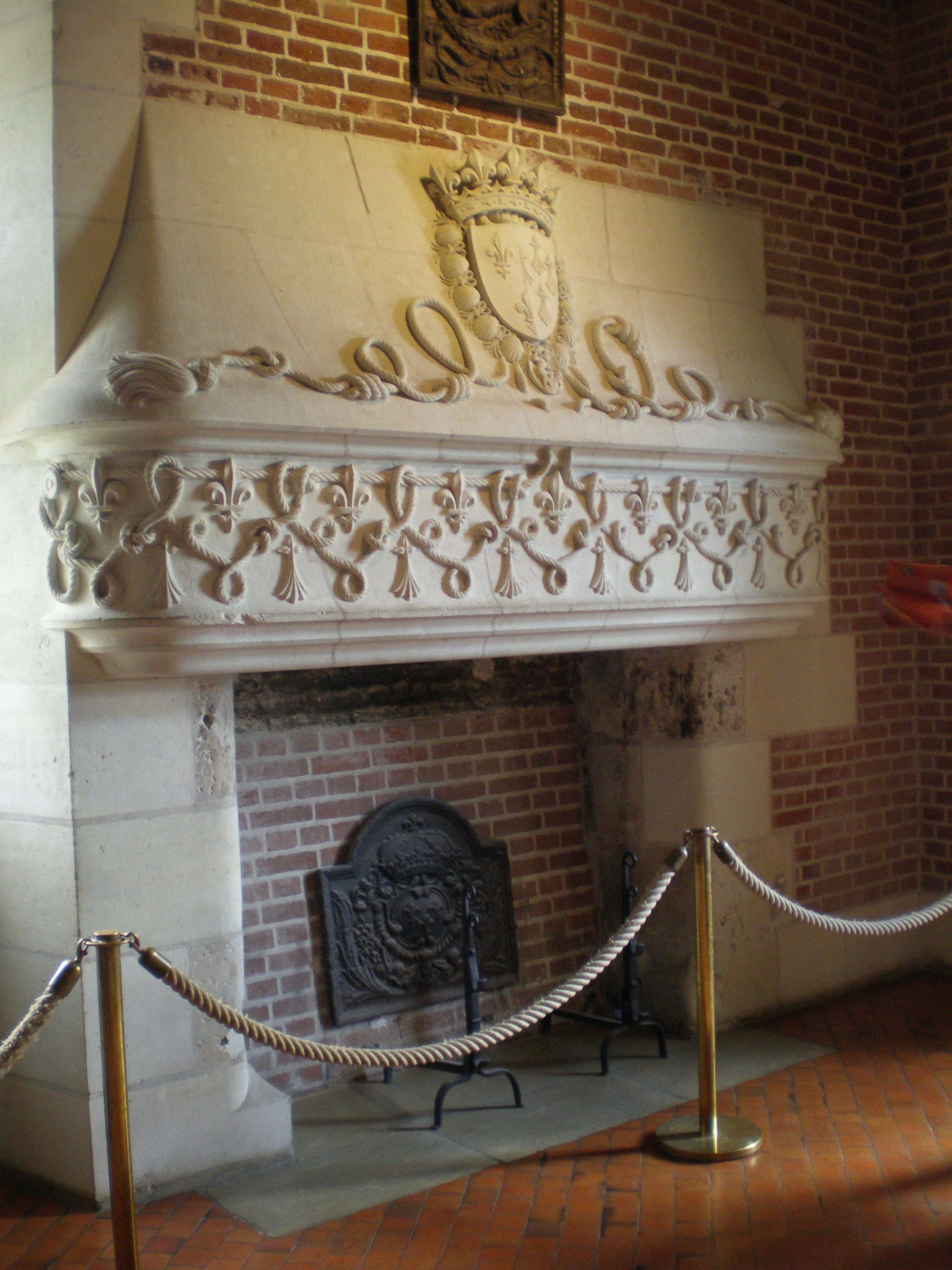 Intérieur Chateau d'Amboise